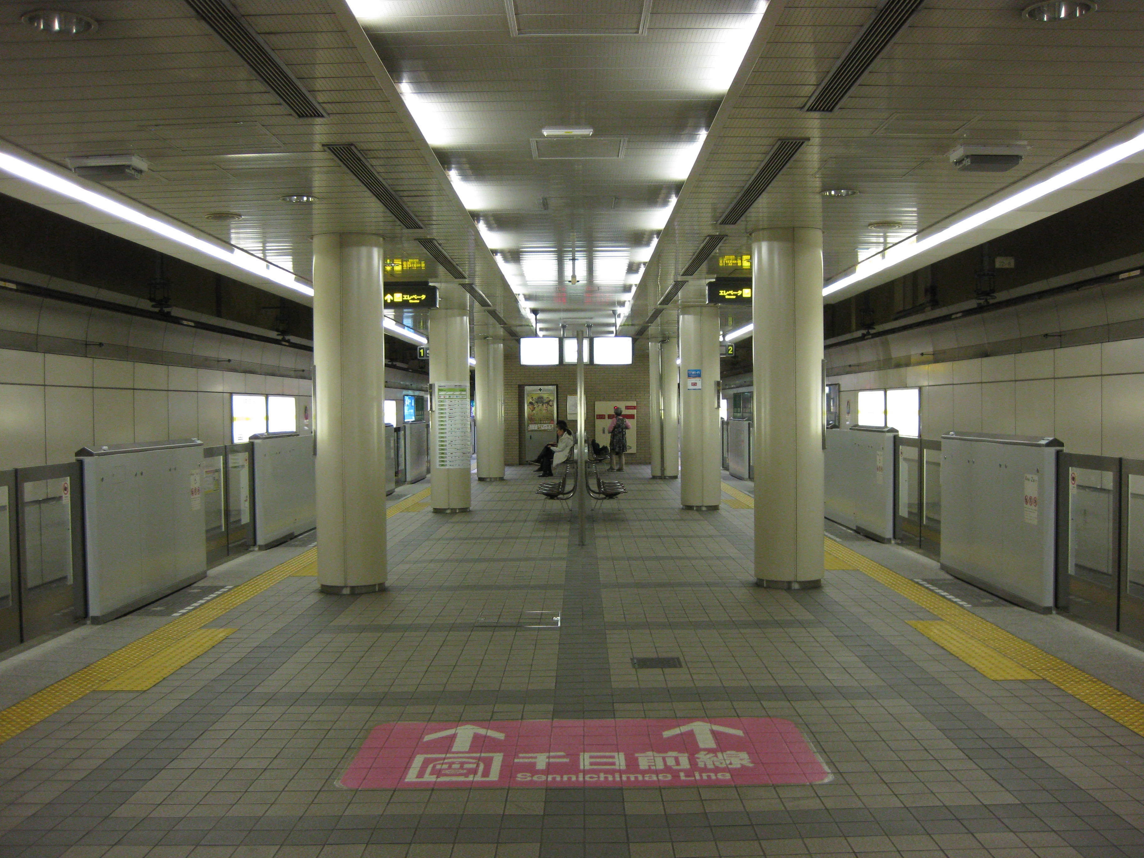 西長堀駅長堀鶴見緑地線プラットホーム